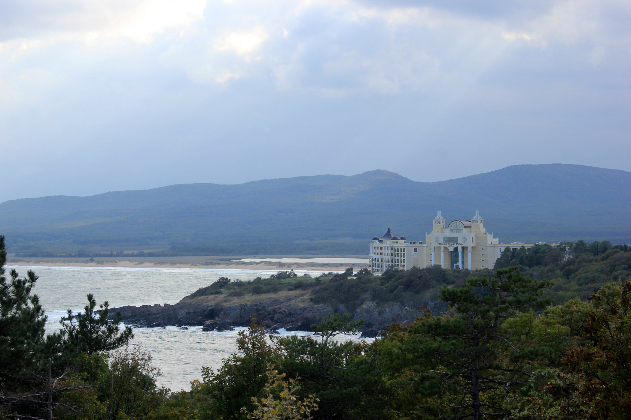 Hotelanlage bei Djuni an der Schwarzmeerküste südlich von Sosopol (Kap Agalina), Bulgarien.